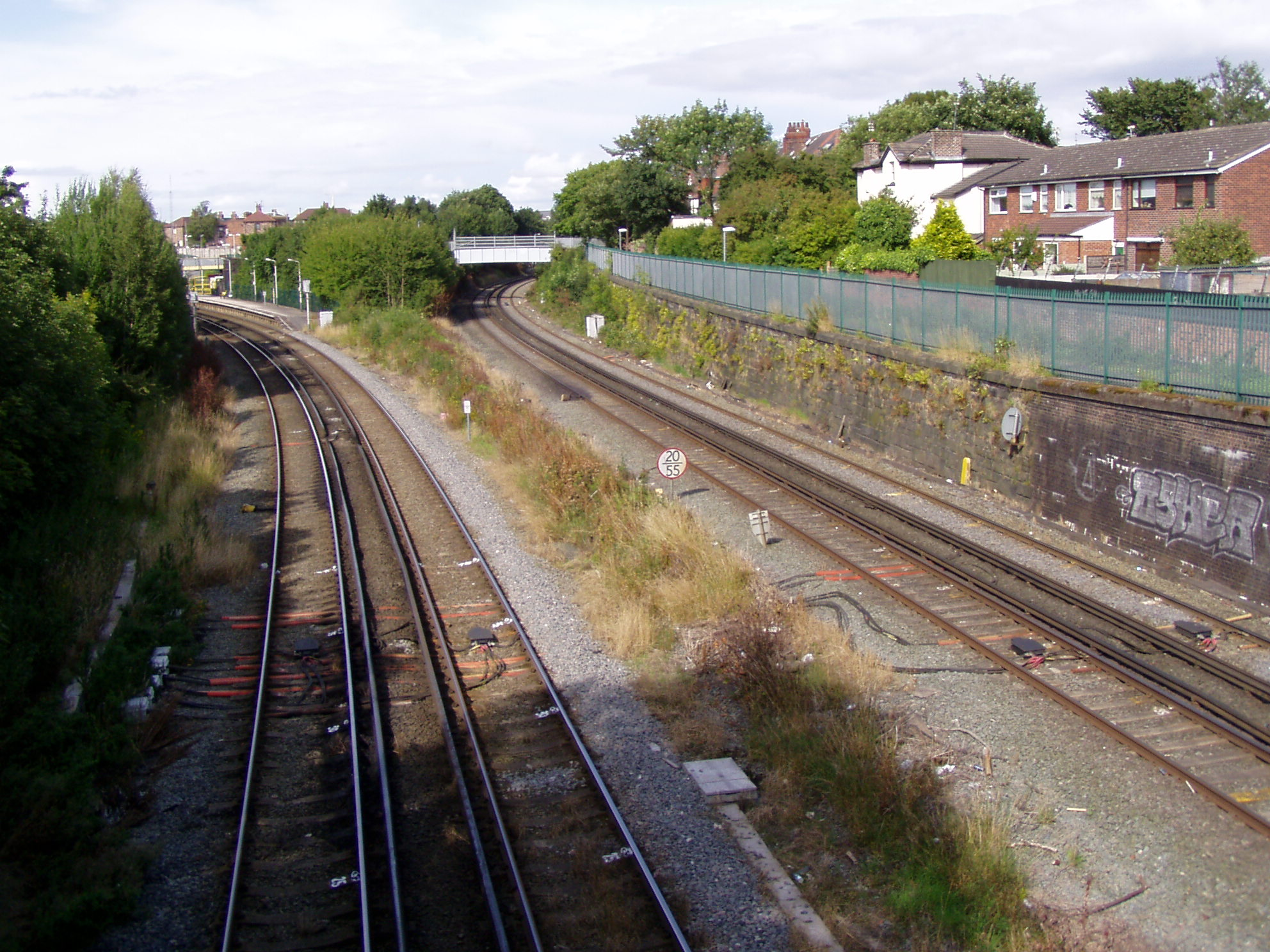 Ormskirk and Kirkby branches diverge